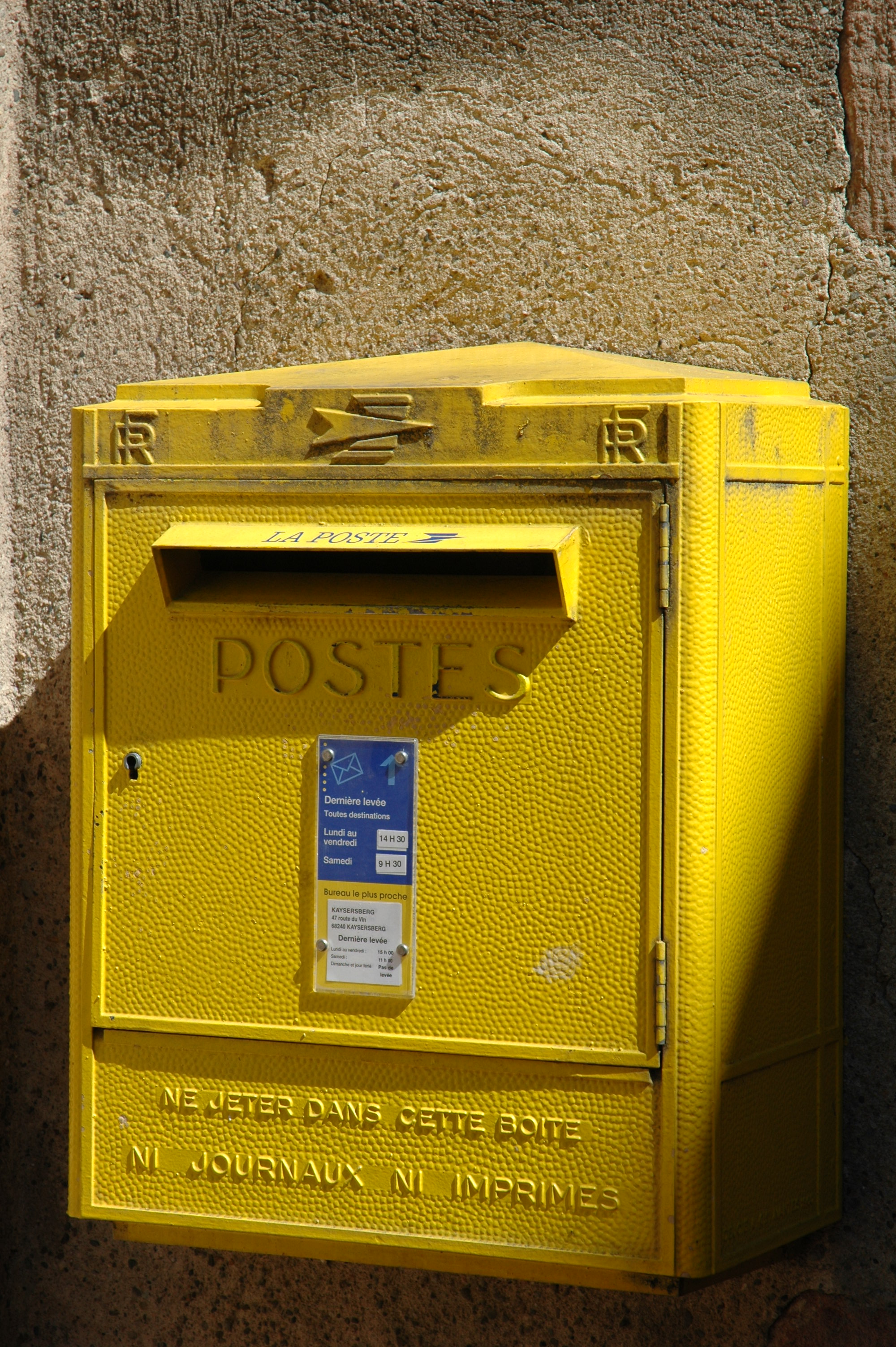 Boîte aux lettres murale jaune de la Poste, type Dejoie & Cie Nantes avec logo dit fusée postale en cinq parties, cré par l'affichiste Guy Georget en 1960.